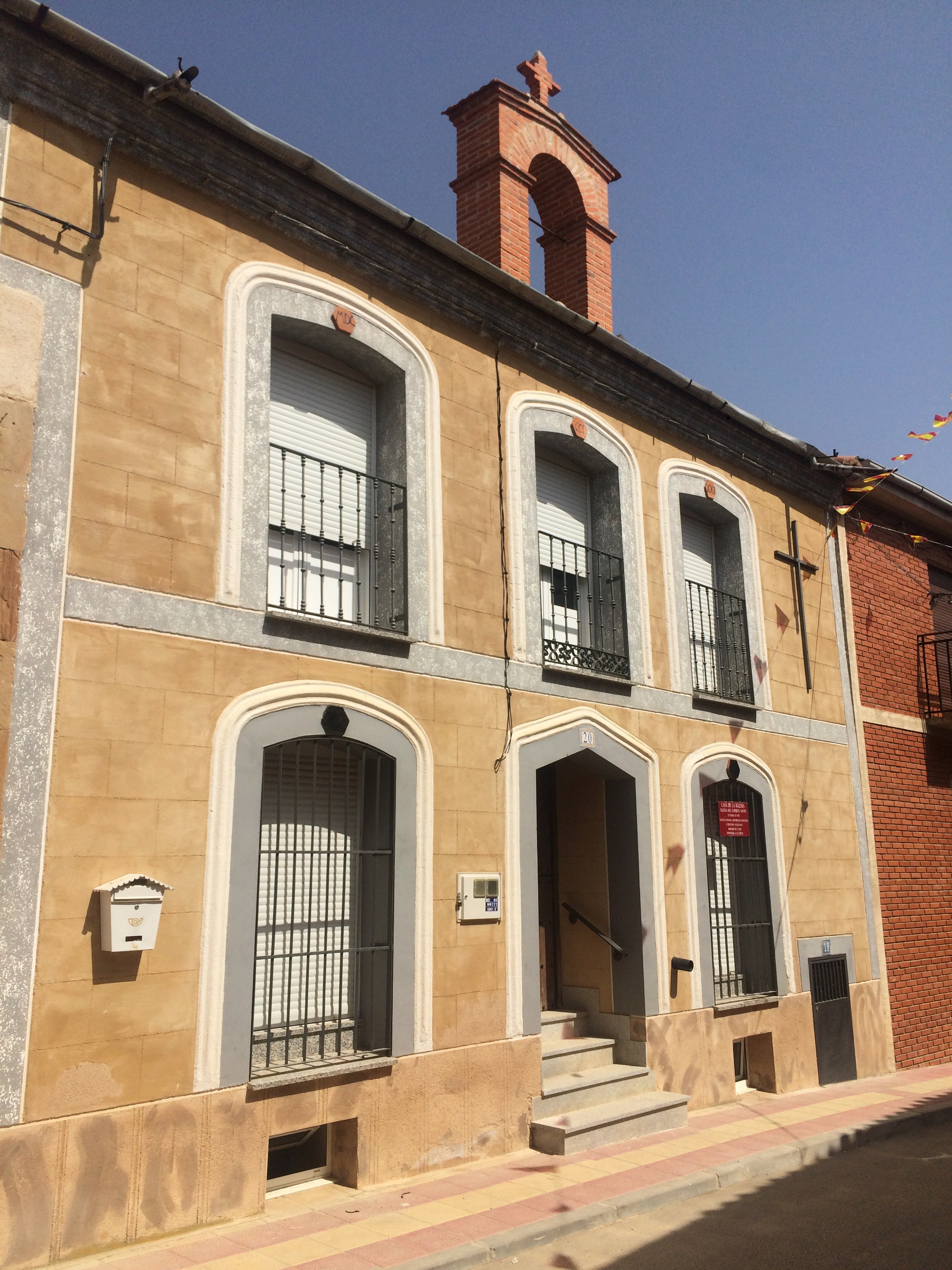 Exterior de la Iglesia Anglicana del Santo Espíritu (Villaescusa, Zamora, 2018)